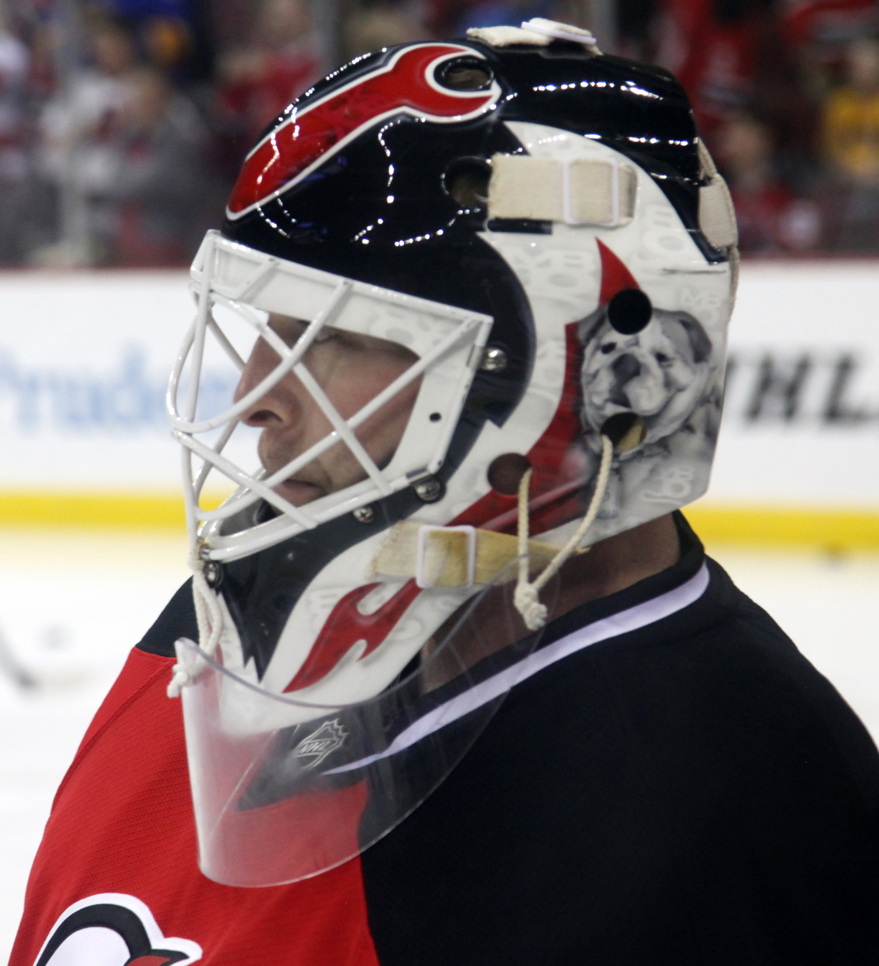 Brodeur on April 11, 2014.